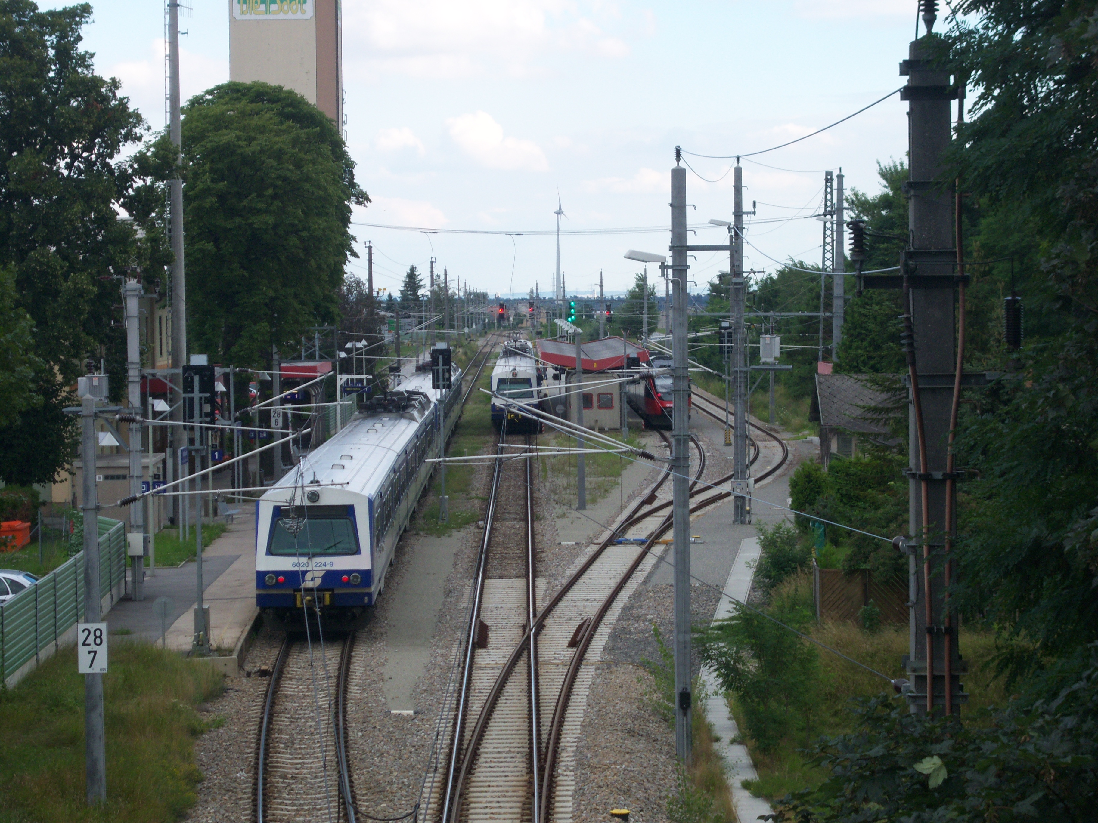 3 S-Bahnen im Bahnhof Wolkersdorf